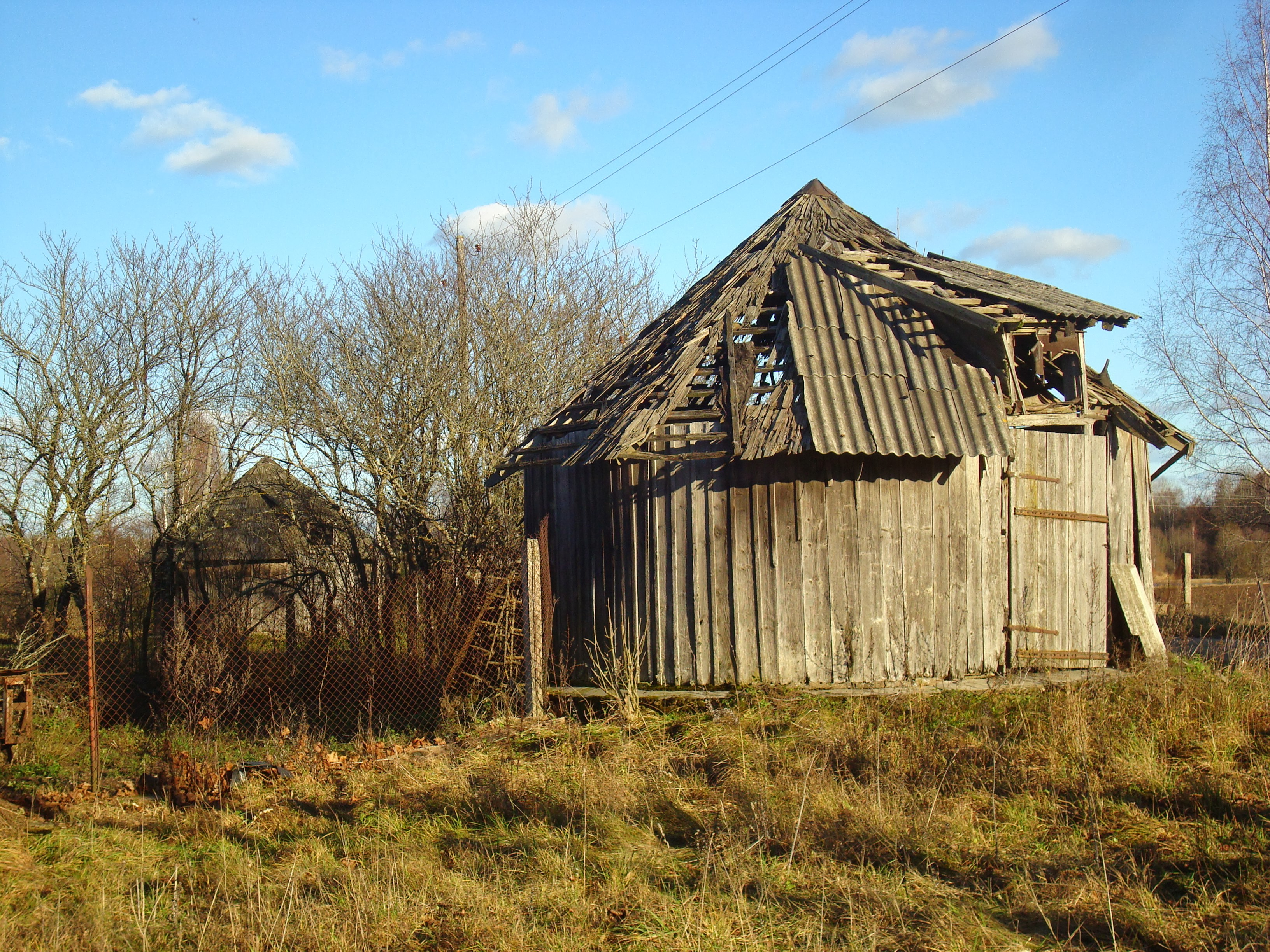 Lodes muižā